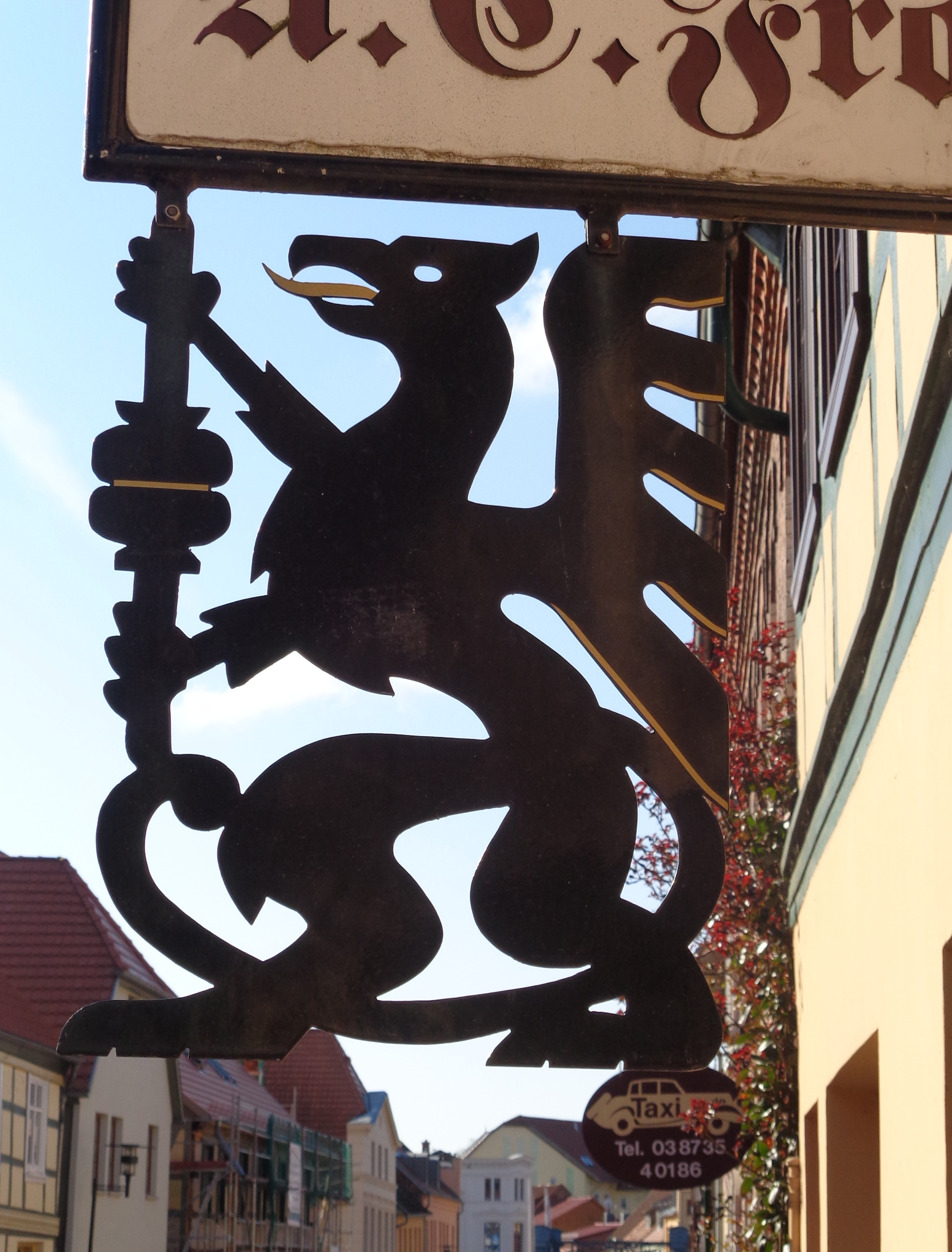 Zunftzeichen an einer Druckerei in Plau am See